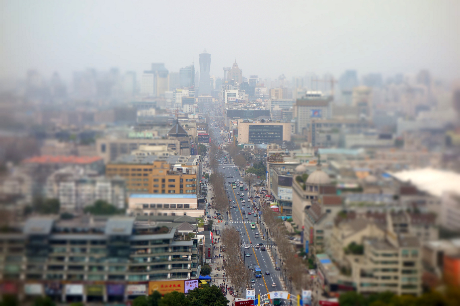 吴山听风 西湖 延安路